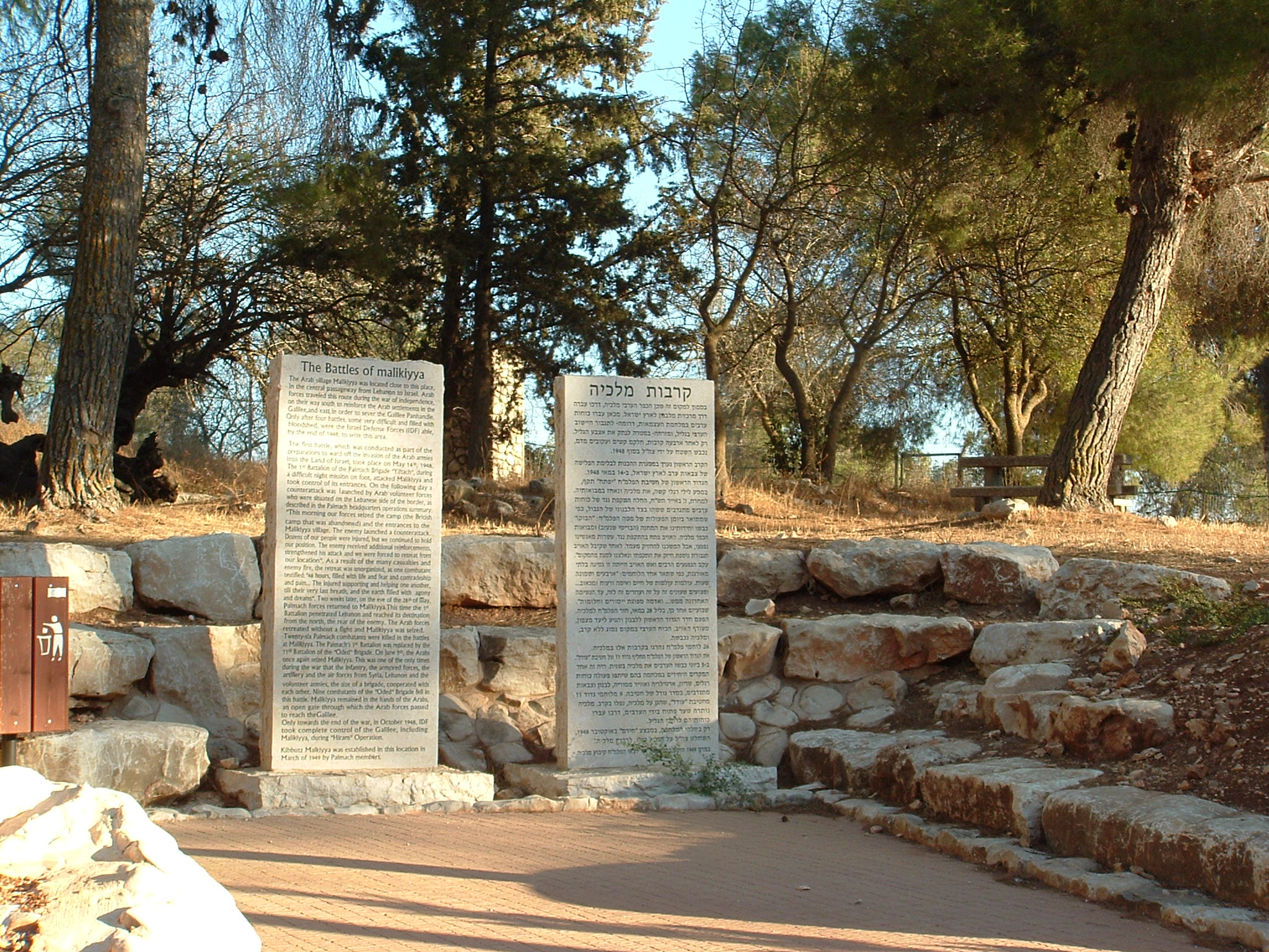 קרבות מלכיה הם סדרה של ארבעה קרבות, שניים מהם עתירי נפגעים ישראליים, שהתרחשו במהלך מלחמת העצמאות בסמוך למלכיה, שעל גבול לבנון